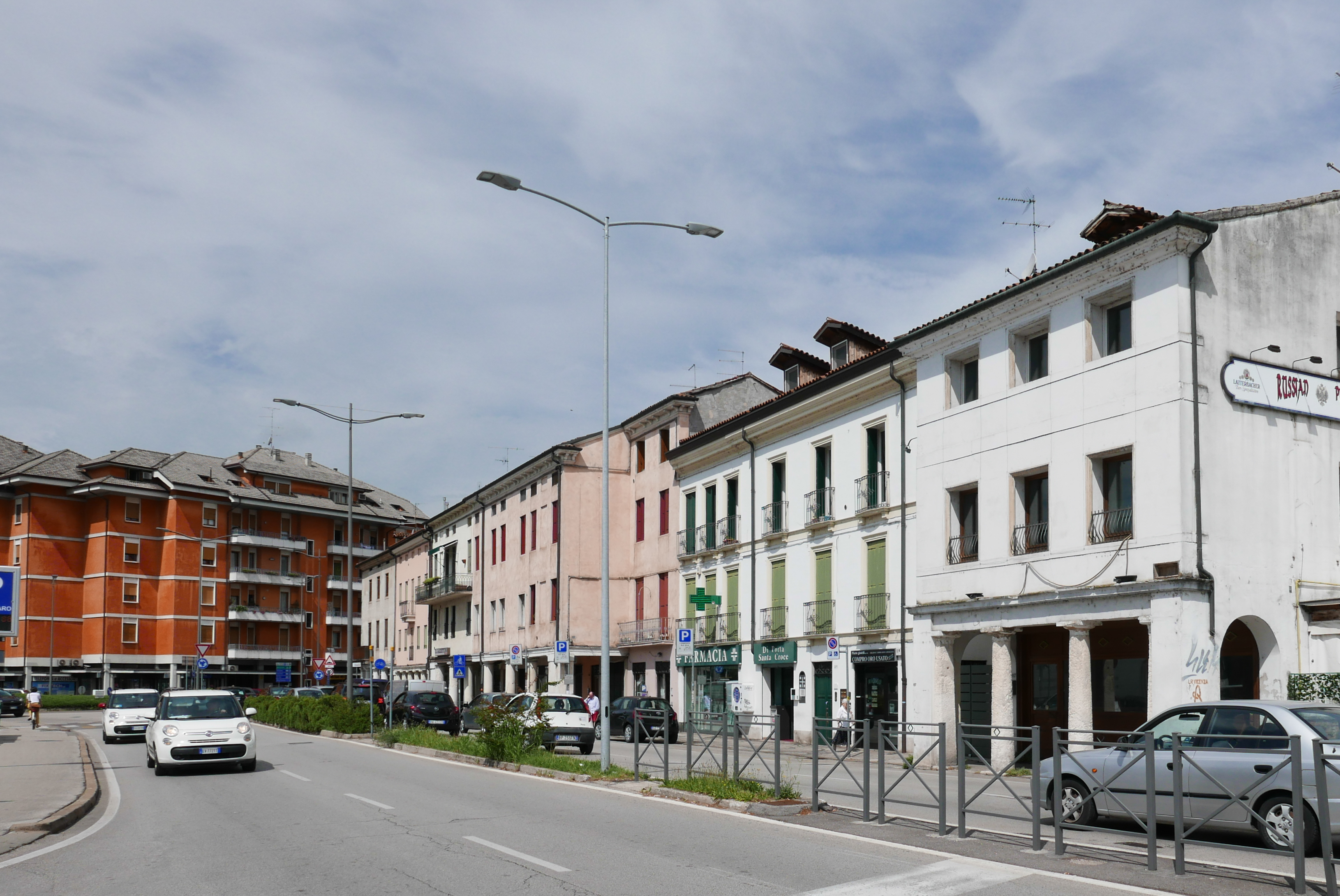 Case del Borgo Santa Croce a Vicenza